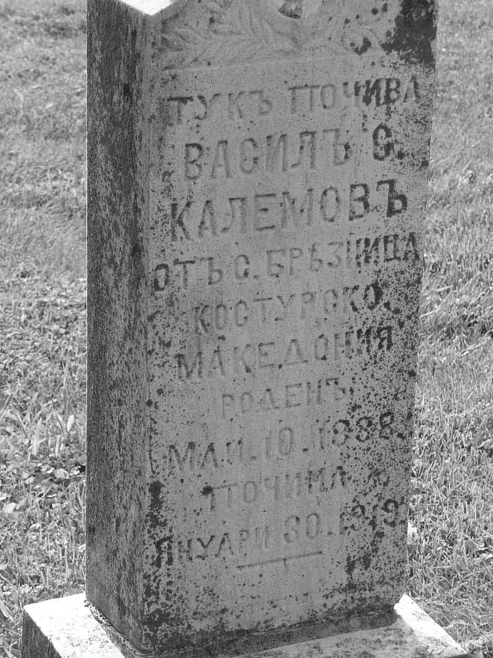 Breznitsa tombstone, Granite City